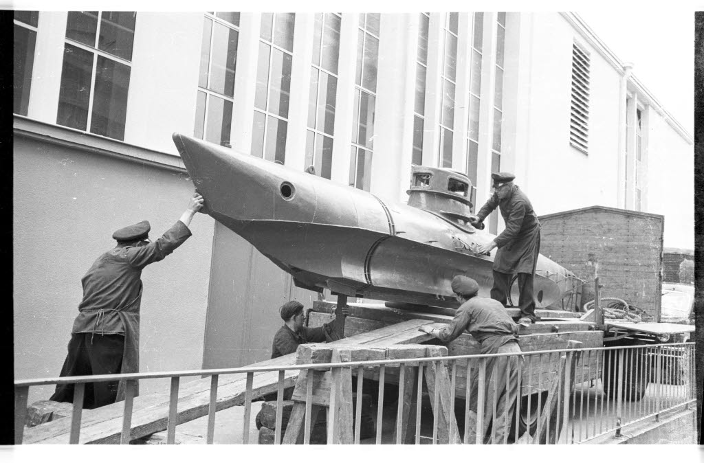 für die Ausstellung "Mein Hooby" in der Ostseehalle.